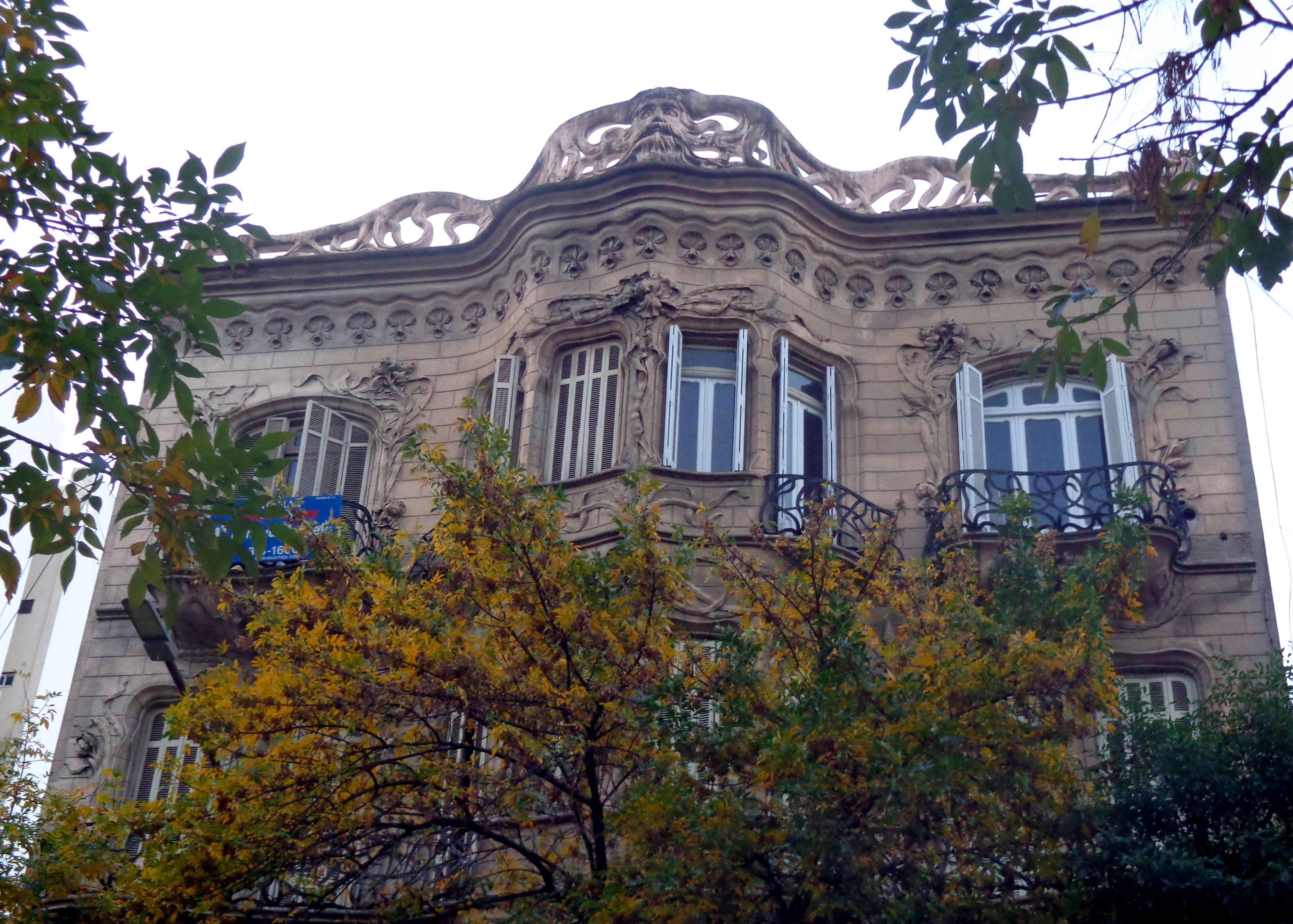 La Casa de los Lirios, del modernismo catalán en el Barrio de Balvanera, ciudad de Buenos Aires, (Avenida Rivadavia 2027 y 2031). Fue construido hacia 1903 o 1905.